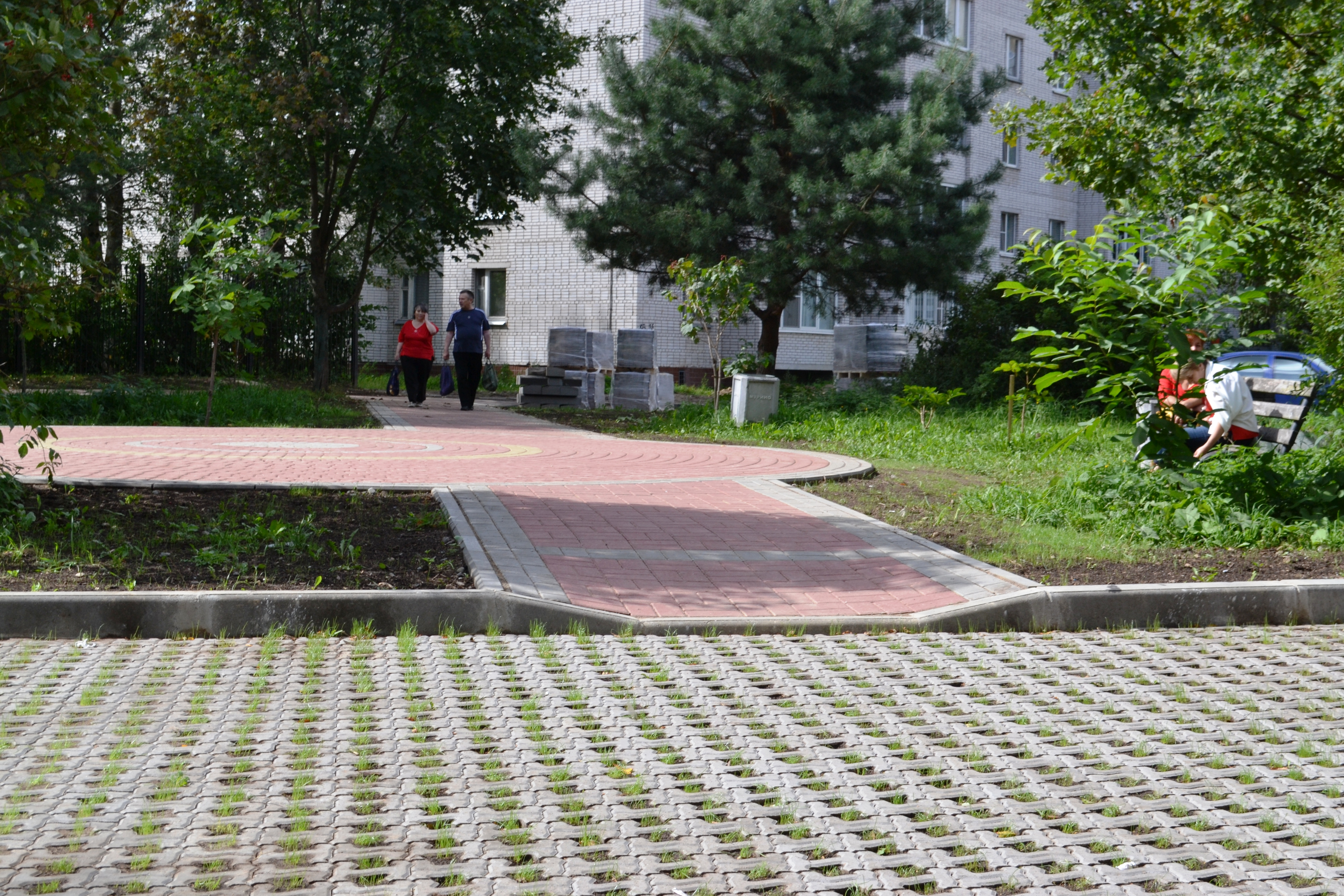 пос Мурино апрель 2013г.